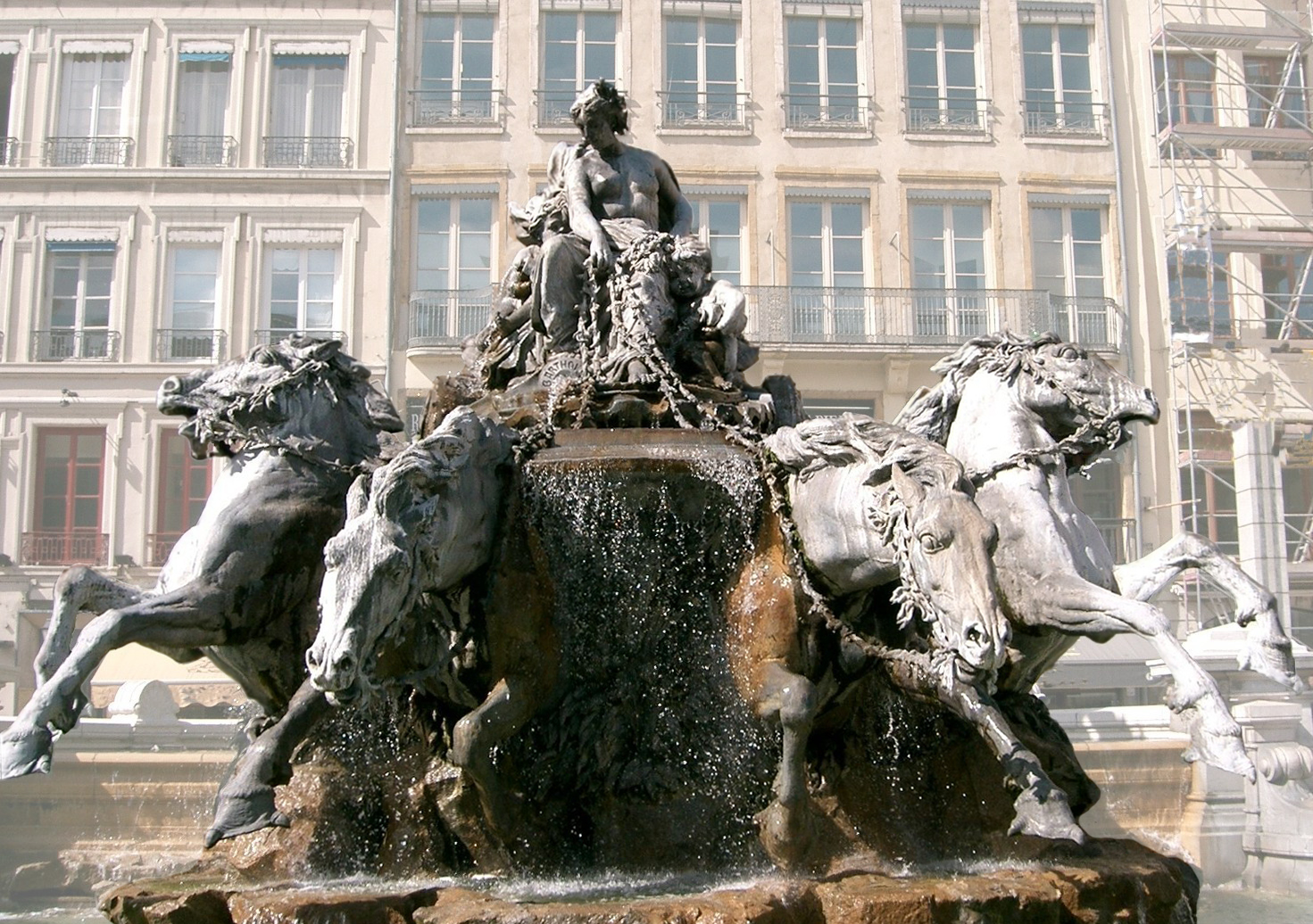 Image: Bartholdi Fontaine des Terreaux Lyon original.jpg retouchée